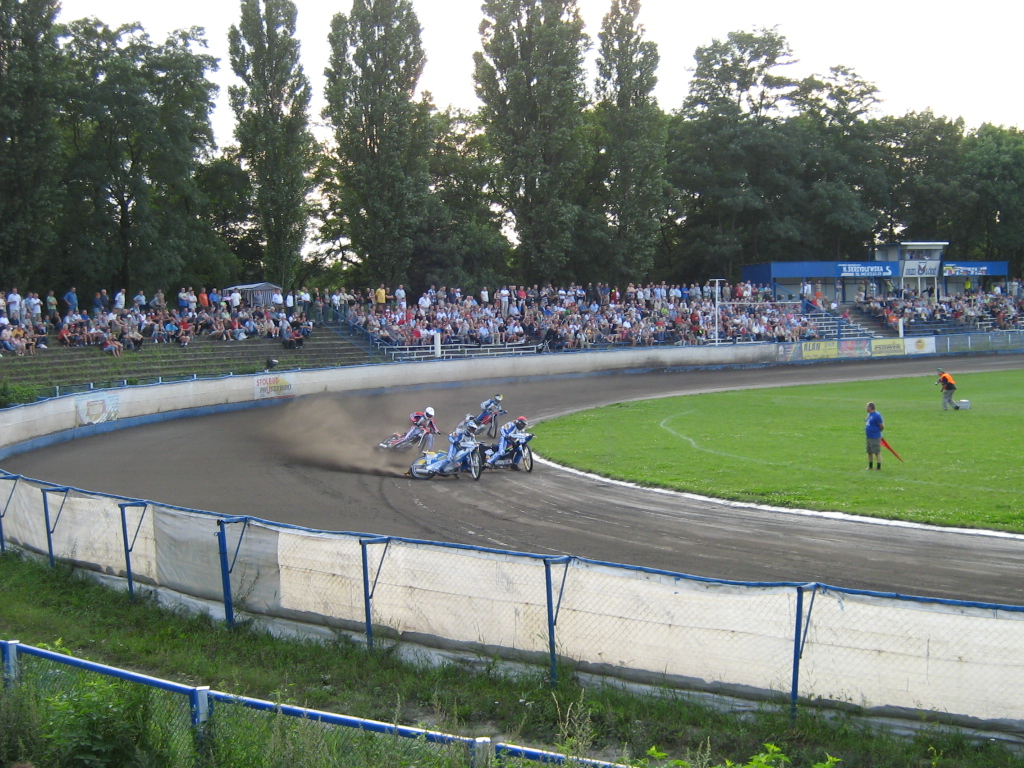 KŻ Orzeł Łódź - mecz z AK Marketa Praga